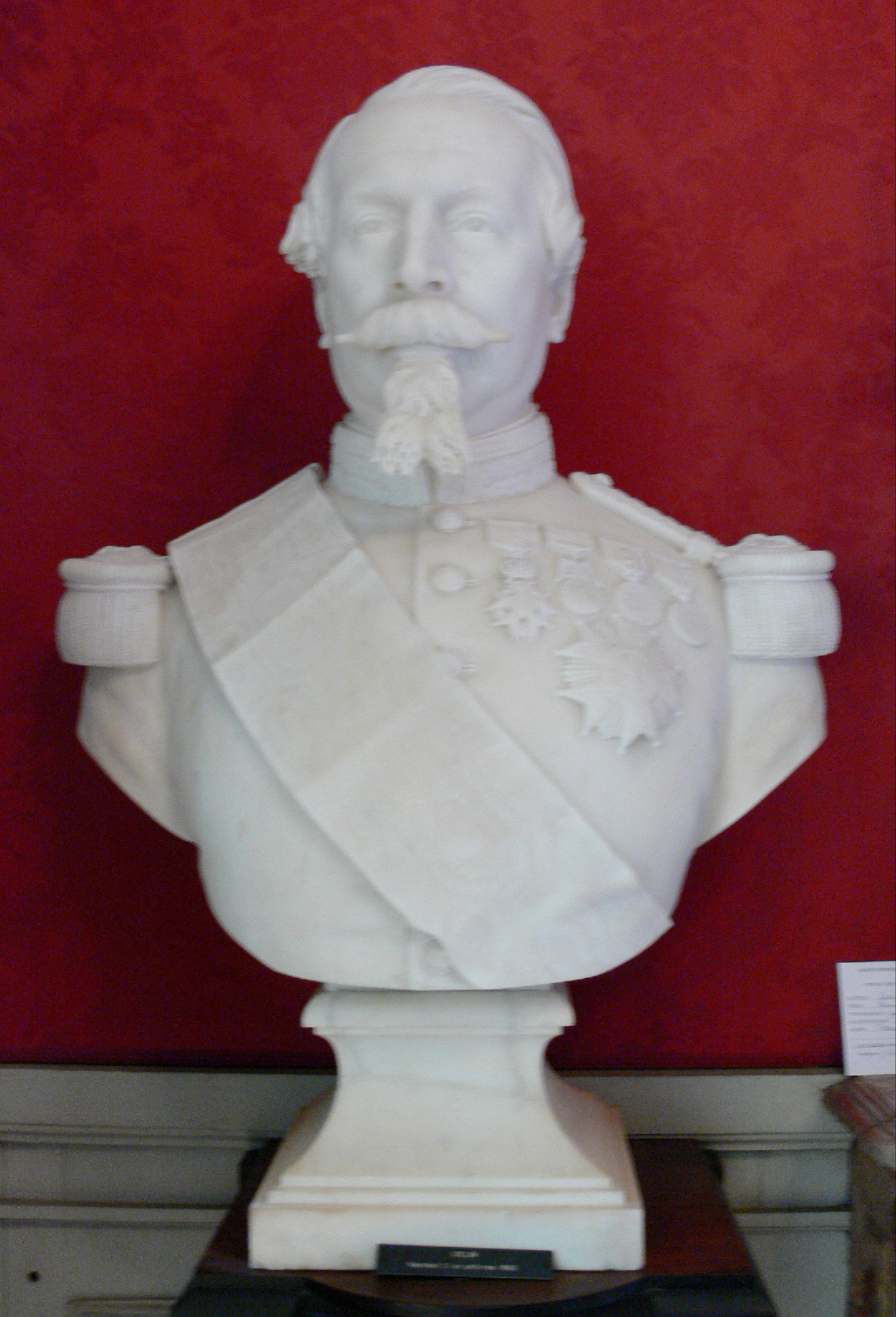 Compiègne, France: Château de Compiègne; Musée du Second Empire: Portrait en buste de Napoleon III de Henri Iselin.[1]